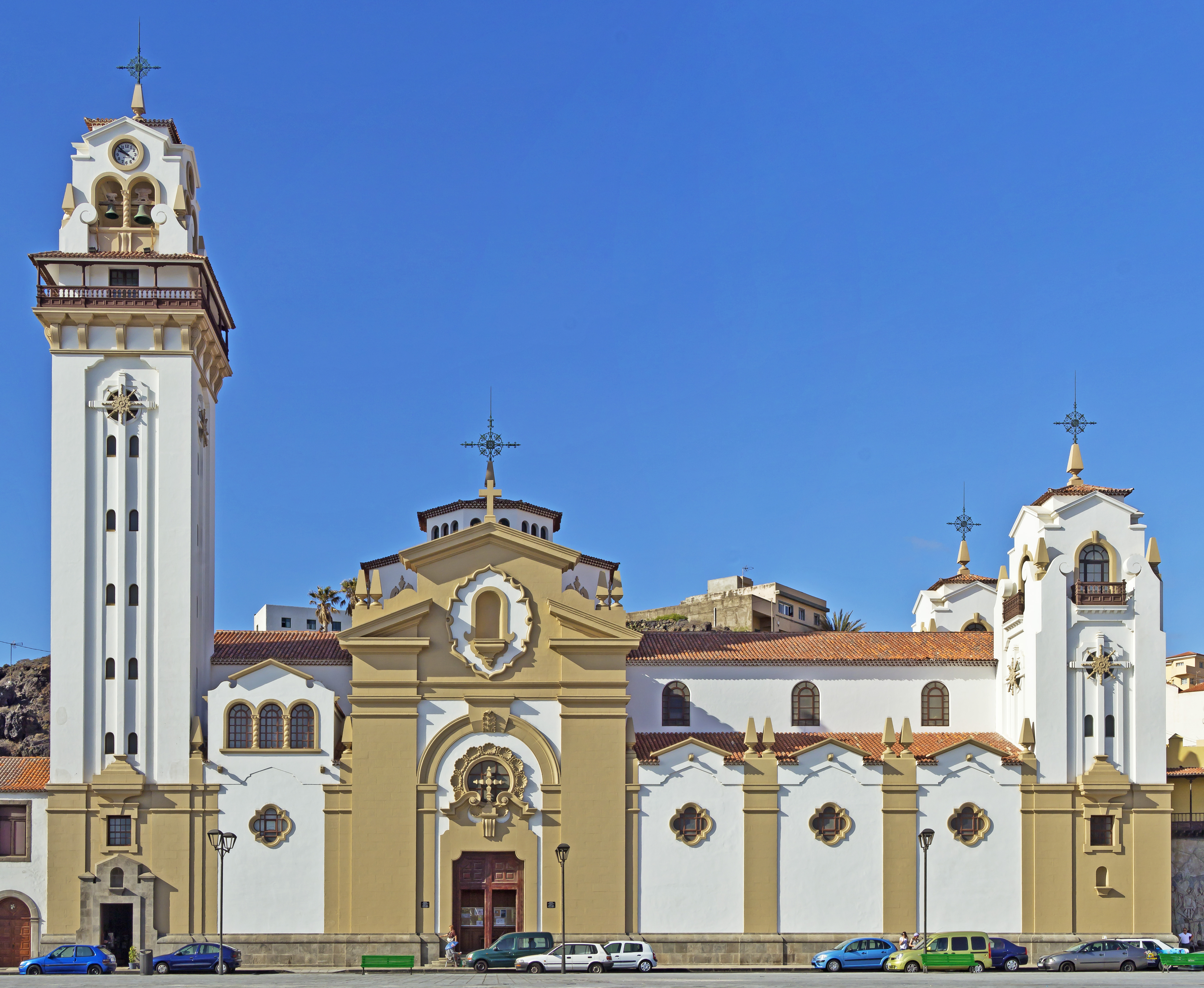 Die Basilika Nuestra Señora de Candelaria von Norden gesehen